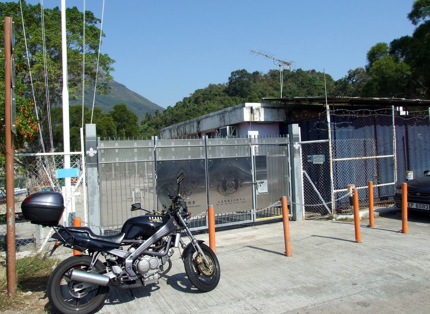 大尾篤劉皇發海上活動中心正門